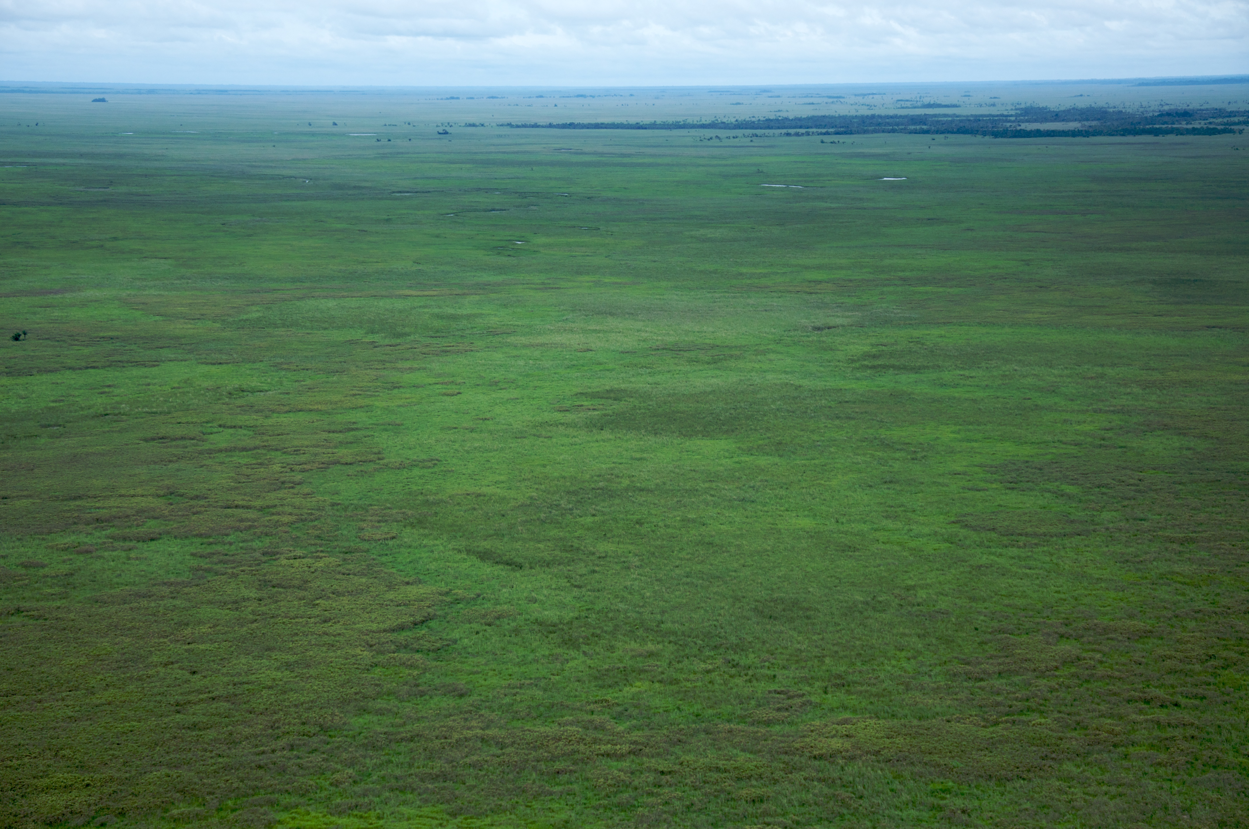 vista aérea del los llanos del Beni o sabana, una de las ecorregiones más grandes de Bolivia.